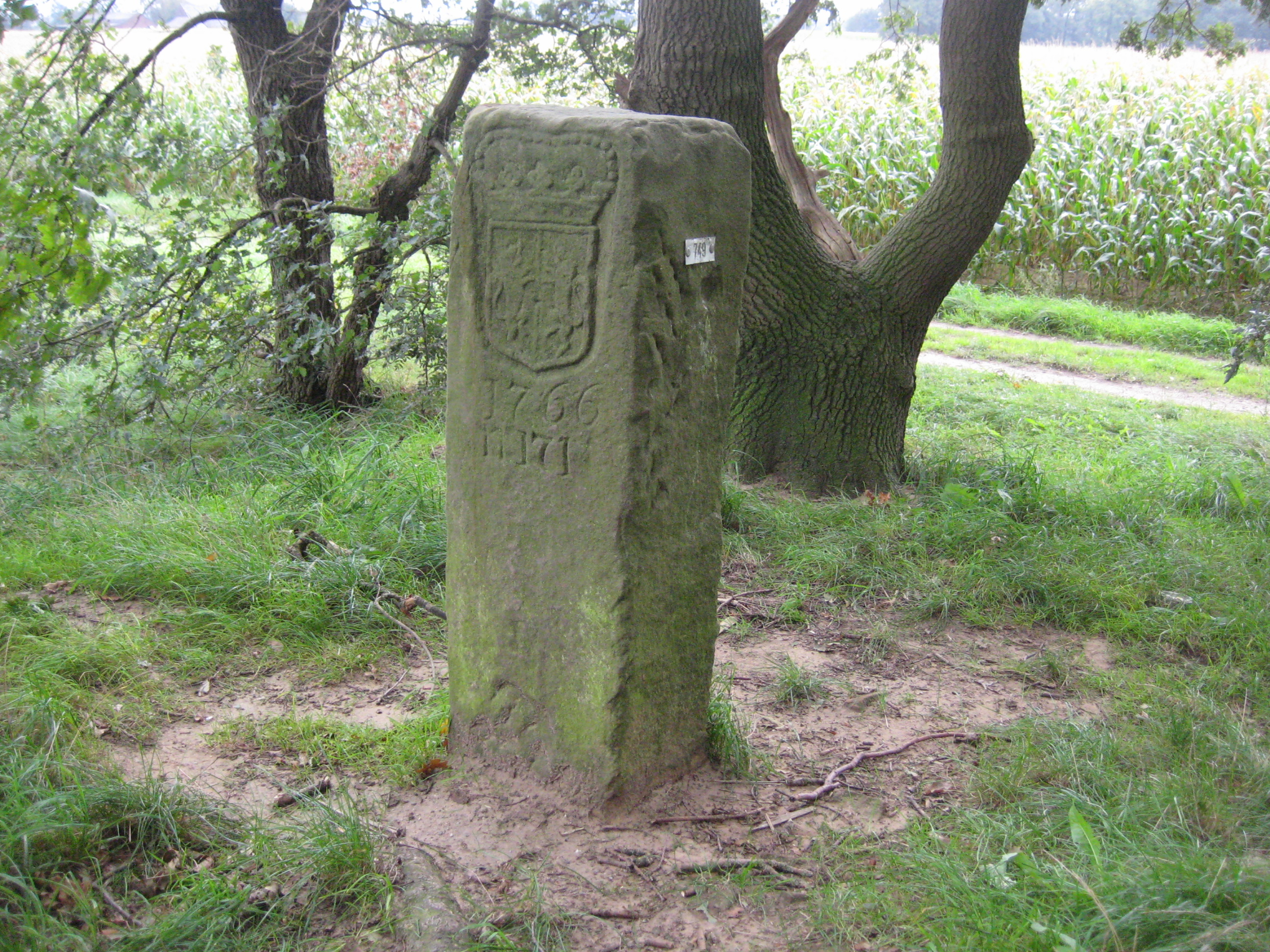 Rood stenen grenspaal, gesitueerd op de grens tussen Nederland en Duitsland aan de Veenhuisweg in Aalten. Aan Nederlandse zijde staat het wapen van Gelderland en "1766", aan Duitse zijde staat het wapen van Münster afgebeeld.